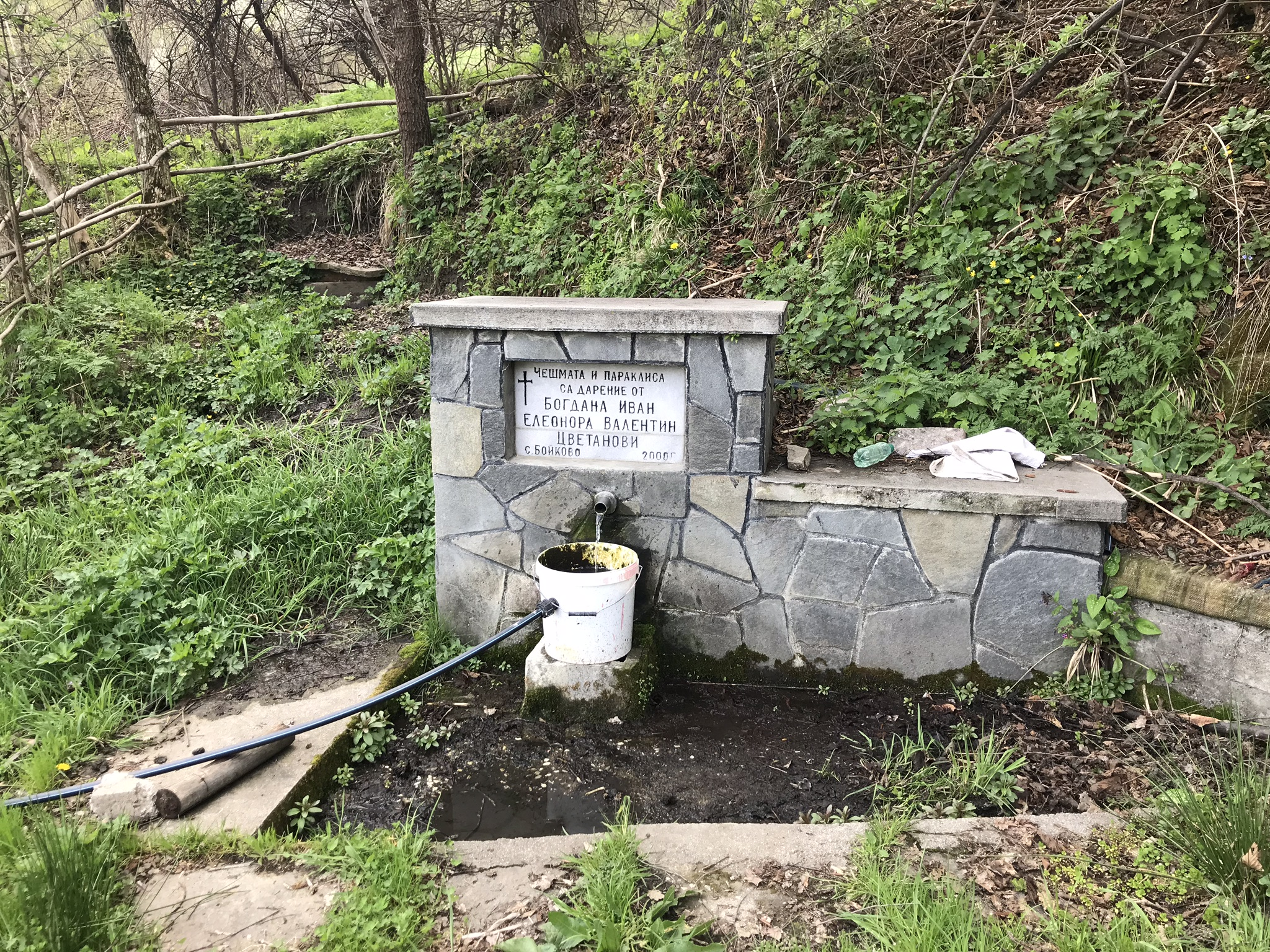 Чешма до параклис “Св.Георги, Св. Неделя”, с. Бойково